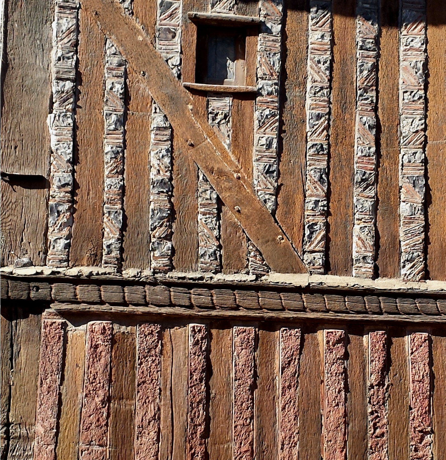 Détail du hourdage en silex et tuileaux, entrecolombage